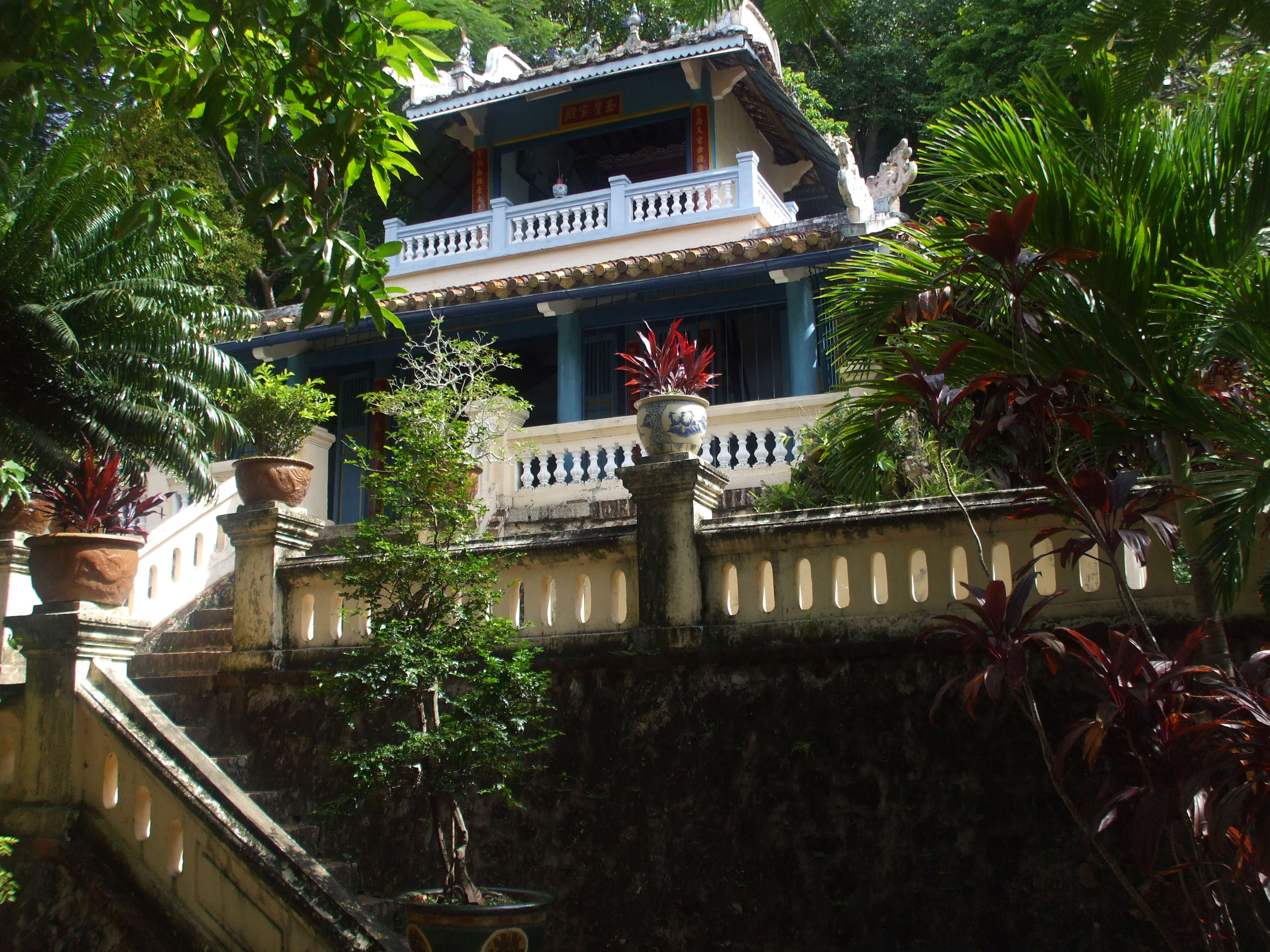 Điện Ngọc Hoàng ở phía sau chính điện chùa Phù Dung (Hà Tiên, Kiên Giang, Việt Nam).